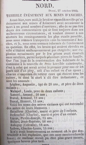 texte journal